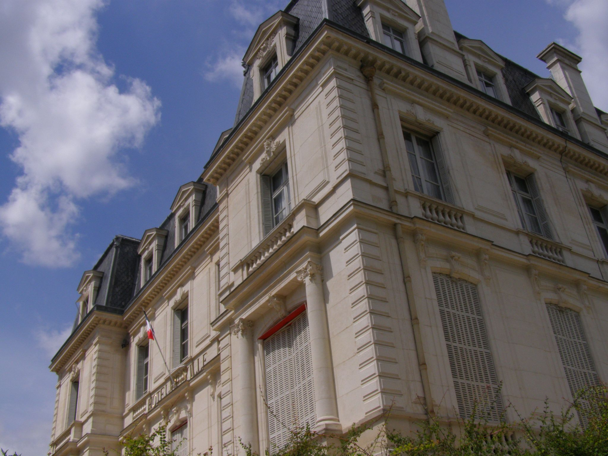 Hôtel de ville de Romorantin-Lanthenay, Loir-et-Cher, France